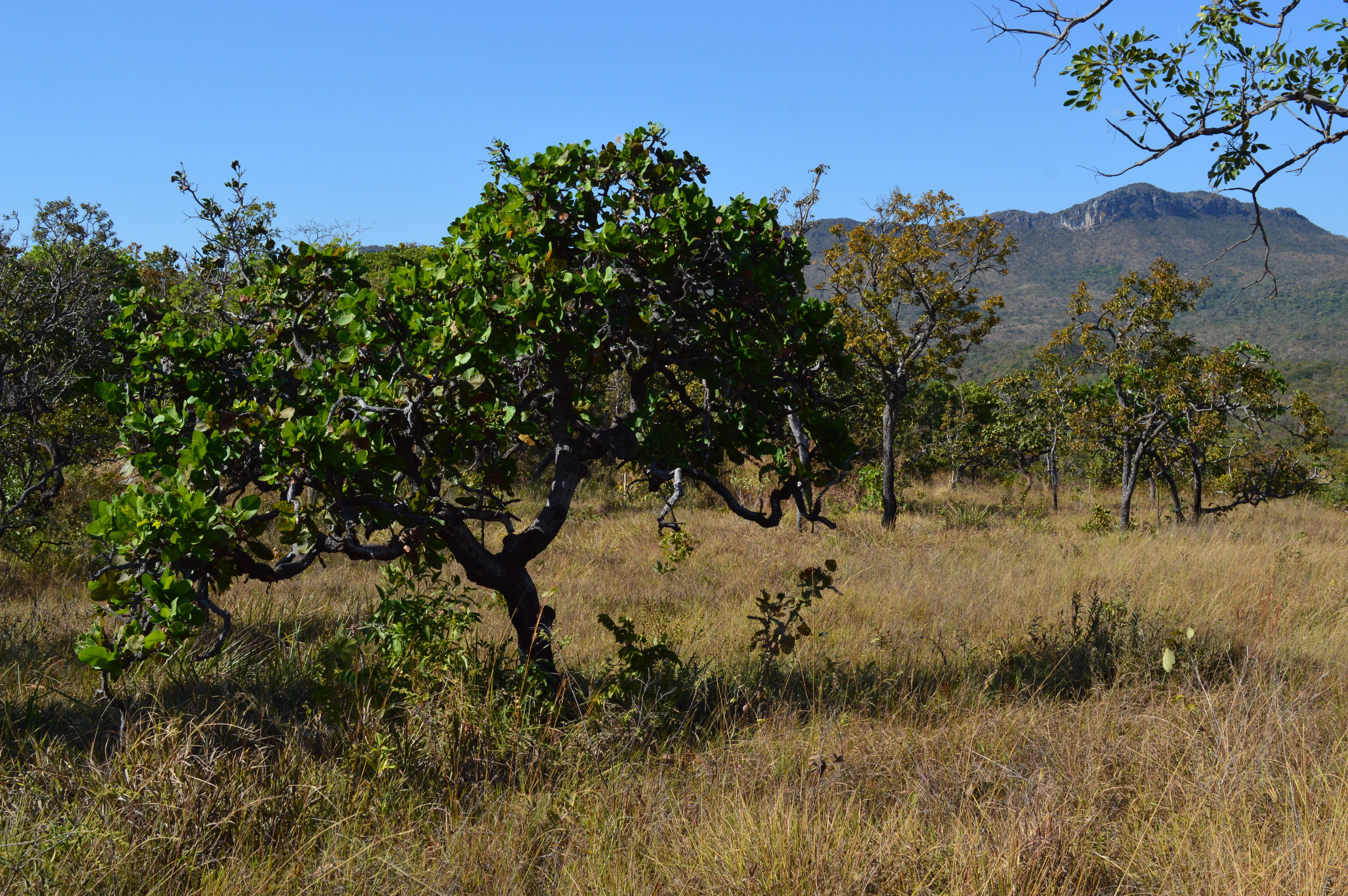 Parque Estadual da Serra Dourada (Goiás - Brasil). Em primeiro plano: planta do cerrado chamada "cajuzinho" ou "cajuzinho-do-cerrado" (Anacardium humile). As doceiras de Goiás Velho utilizam seu fruto no preparo de uma compota típica da culinária local, o doce de cajuzinho. Ao fundo, vê-se a Serra Dourada.